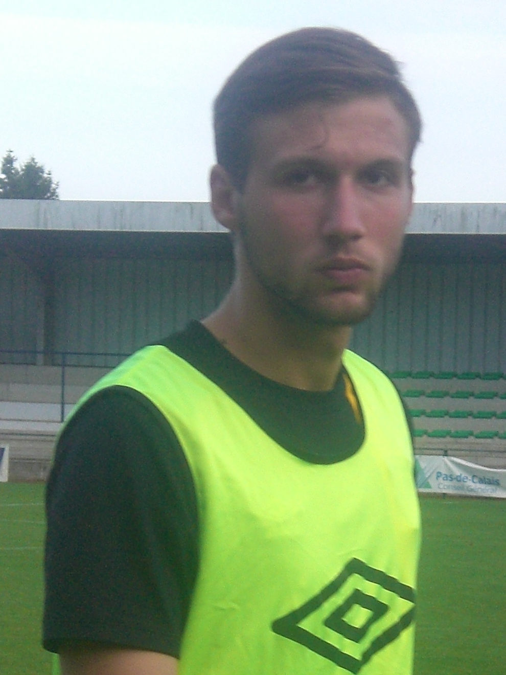 Miloš Zukanović lors du match RC Lens B / IC Croix, comptant pour la troisième journée du Championnat de France de football amateur (CFA), le 29 août 2015, au Stade François Blin d'Avion.